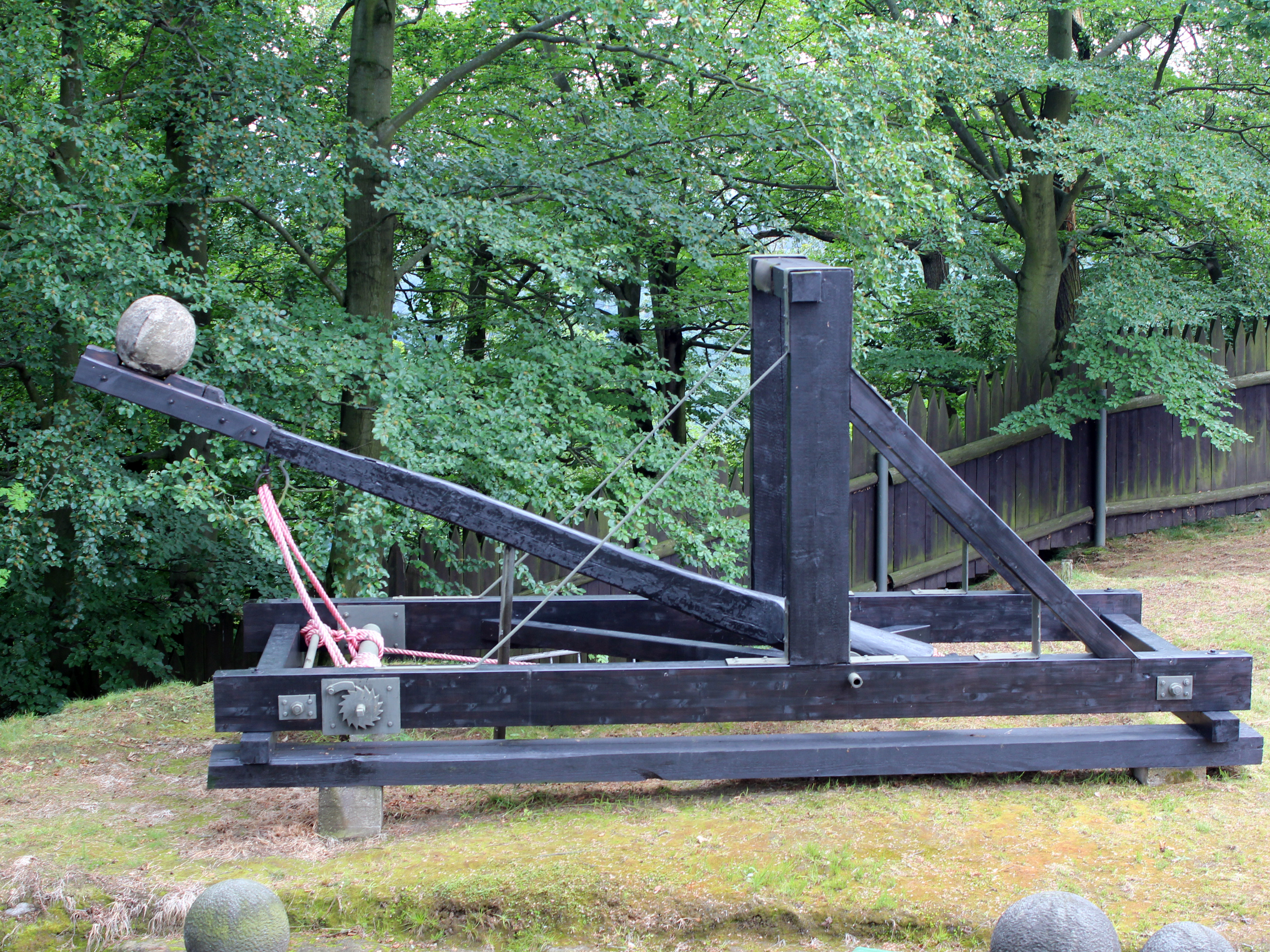 Catapult